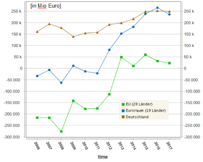 Zahlungsbilanzüberschuss